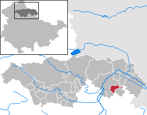 Oberheldrungen in Thuringia - Kyffhäuserkreis